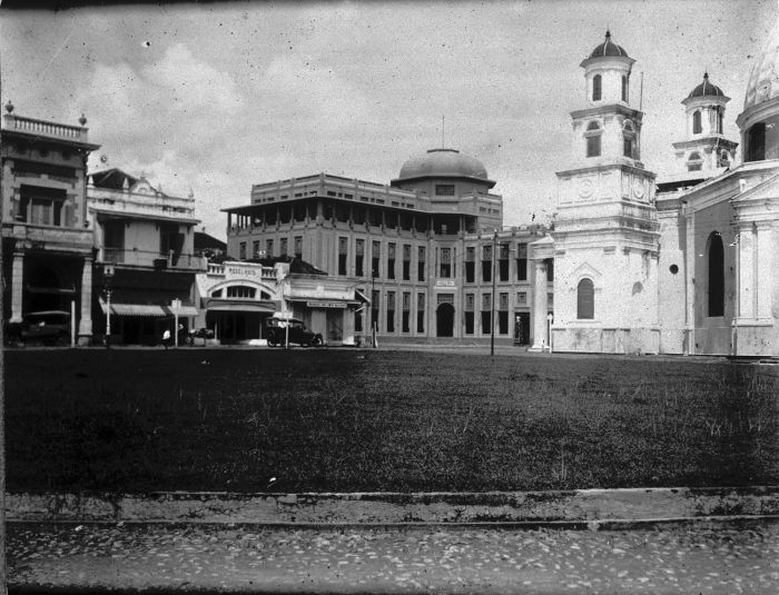 Foto. Kantoor van de N.I.L.L.Maatschappij in Semarang, Java.